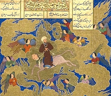 Mahomet, le Voyage nocturne (fragment), Abd al-Razzaq by Jahangi.